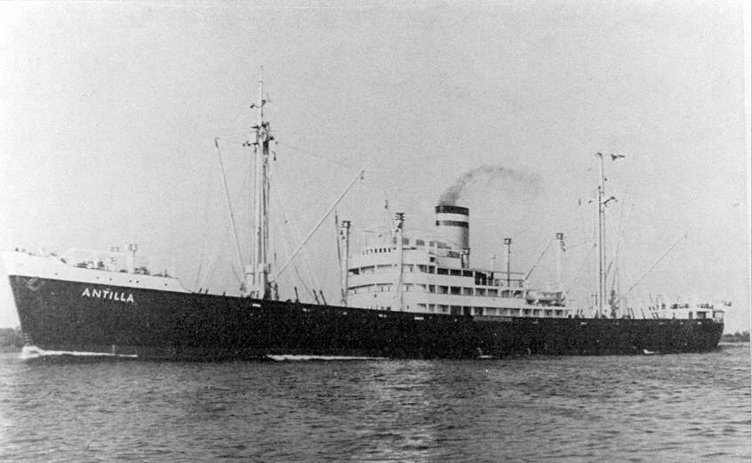 Der Hapag-Frachter Antilla